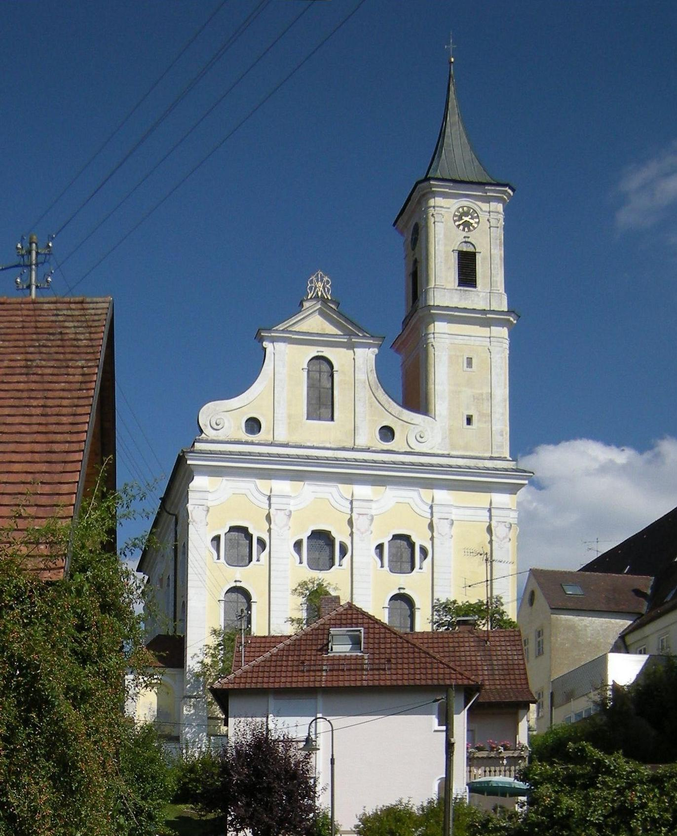 Buxheim (Schwaben) - Pfarrkirche St. Peter und Paul